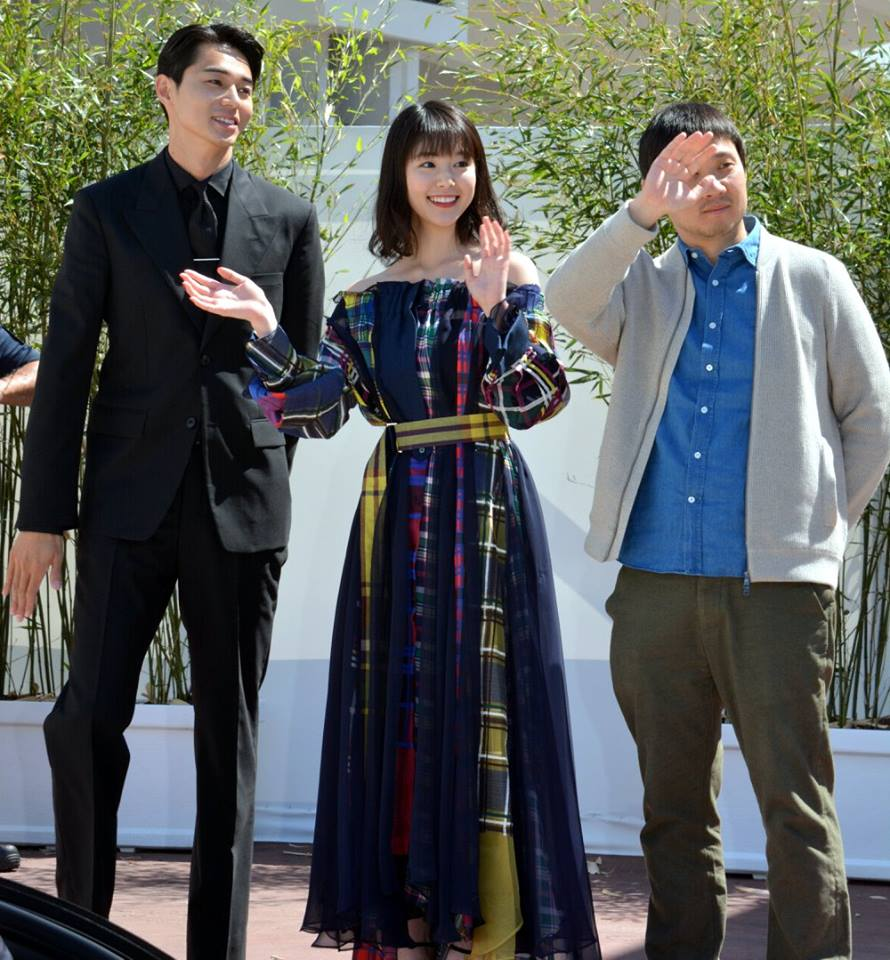 Le réalisateur et les acteurs du film Netemo sametemo au festival de Cannes.